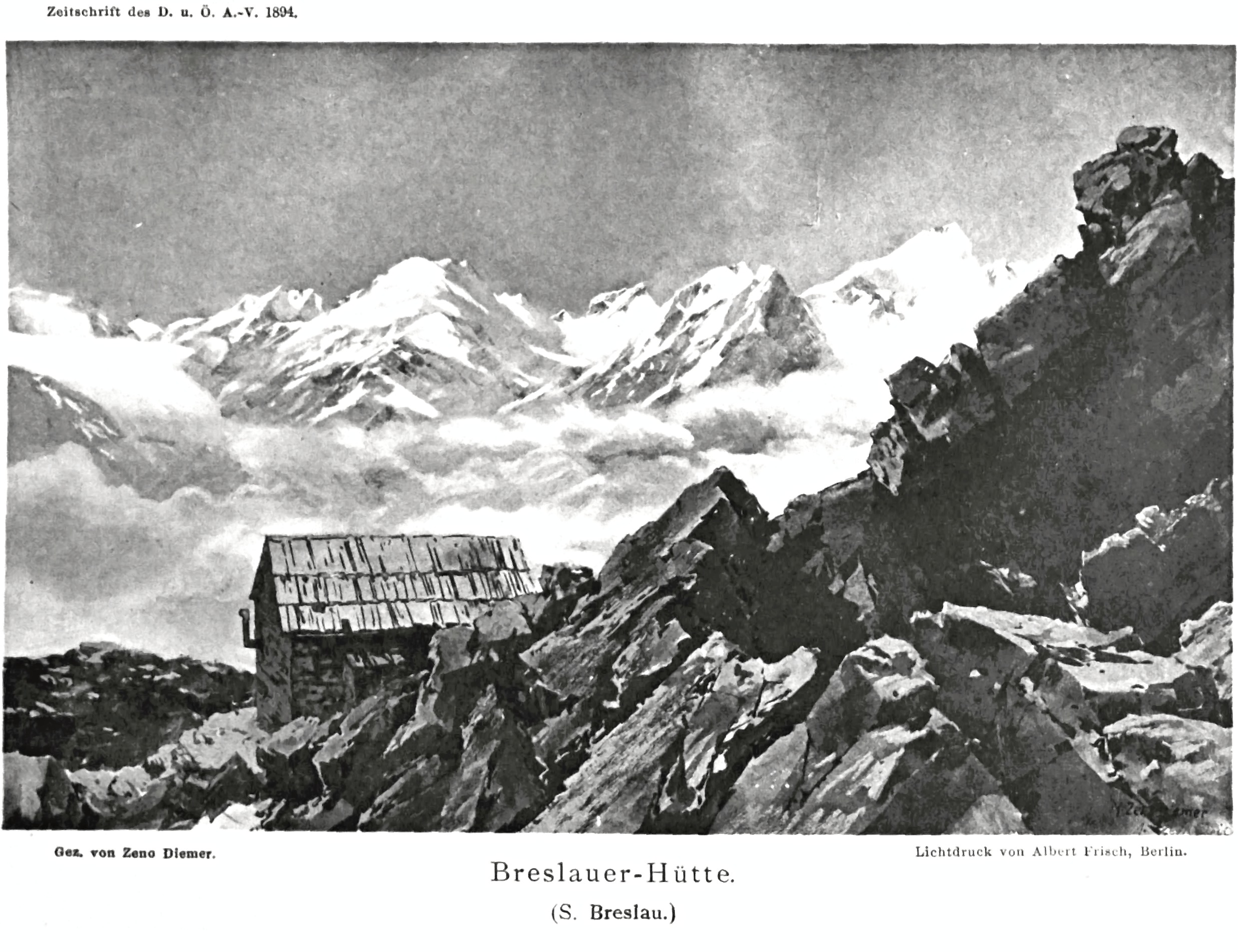 Breslauer Hütte aus Zeitschrift des Deutschen und Oesterreichischen Alpenvereins 1894 Band 25